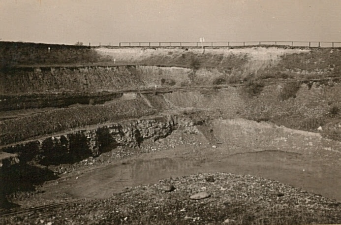 Lehmgrube der Ziegelei Zschertnitz (Stadtgebiet Dresden). Aufnahme aus dem Jahr 1922. Pleistozäner Löss und Lösslehm auf Plänermergel (Oberkreide, Cenoman - Turon)